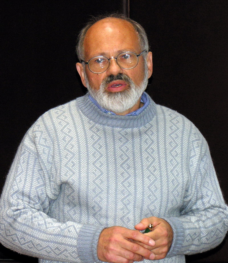 Henrikas Ostrauskas